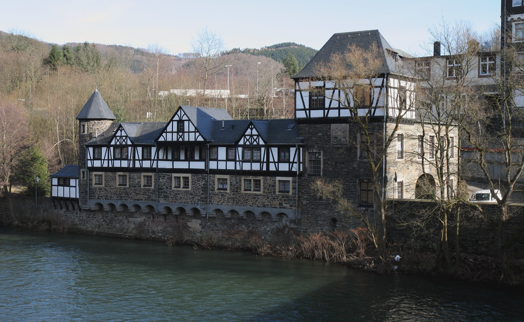 Gebäude der ehemaligen Motorenfabrik Basse & Selve in Altena-Pragpaul. This image shows a heritage building in Germany, located in the North Rhine-Westphalian city Altena (no. A-55).